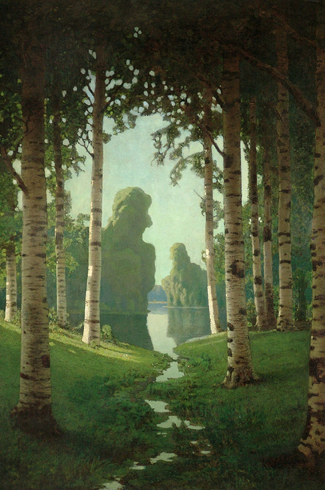 живопись